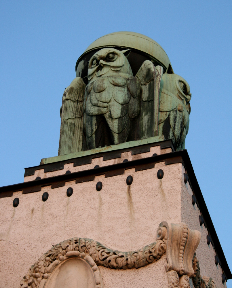 Sove s globusima na Hrvatskom državnom arhivu